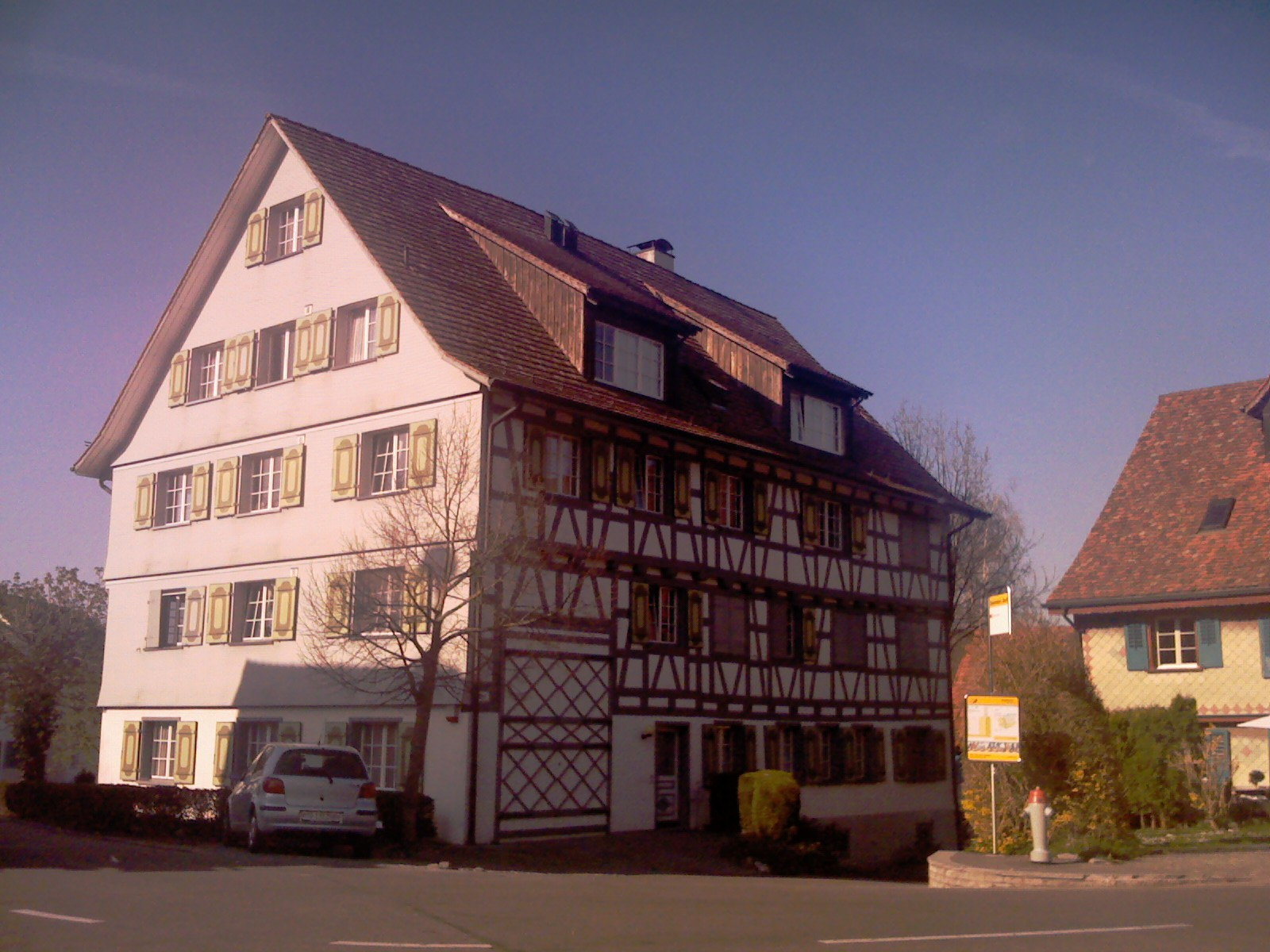 Faktrabdomo en Arenenberg, komunumo Salenstein, Turgovio